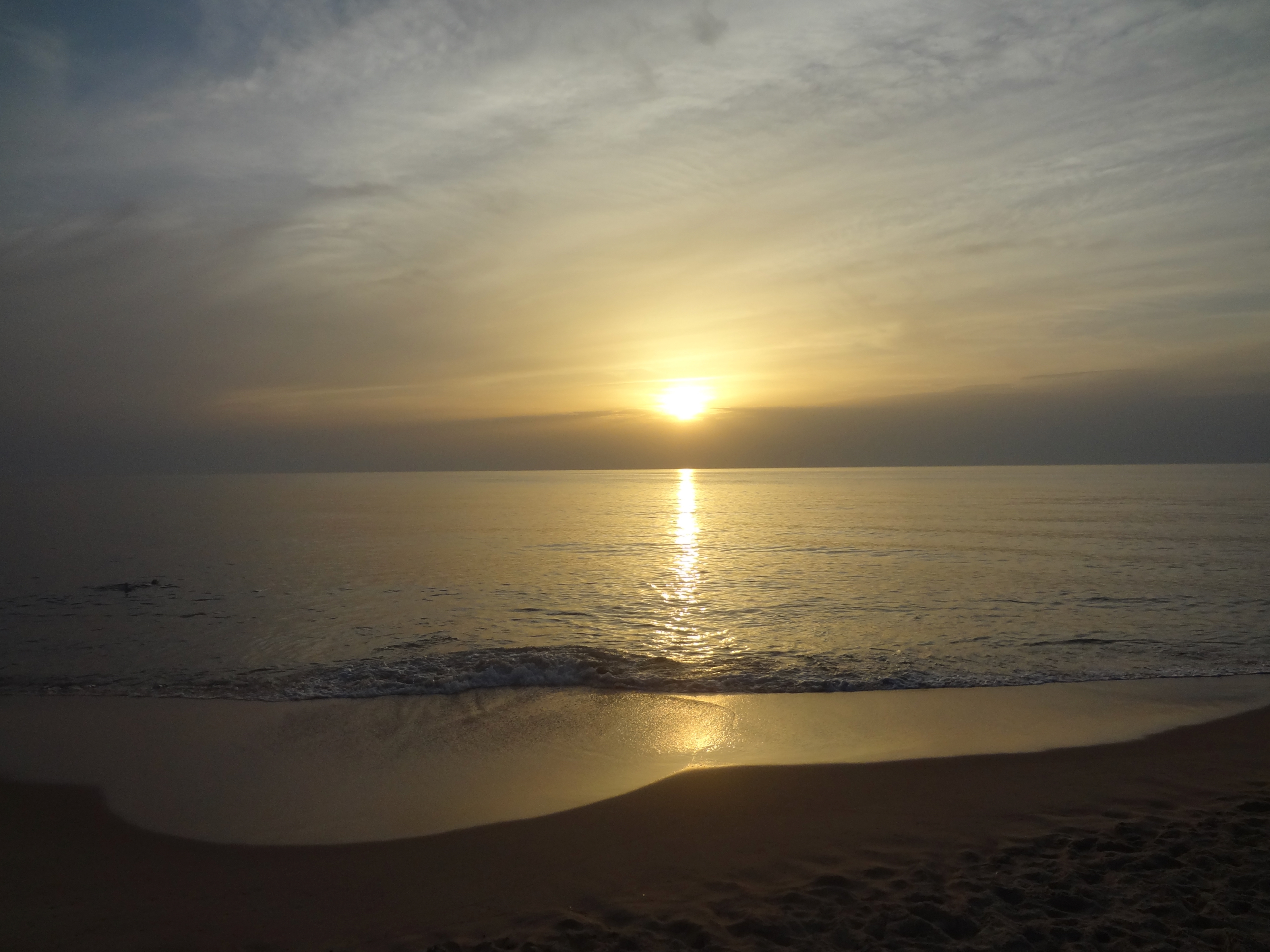 Photo d'un coucher de soleil à la plage du Porge Ocean (Gironde, France)